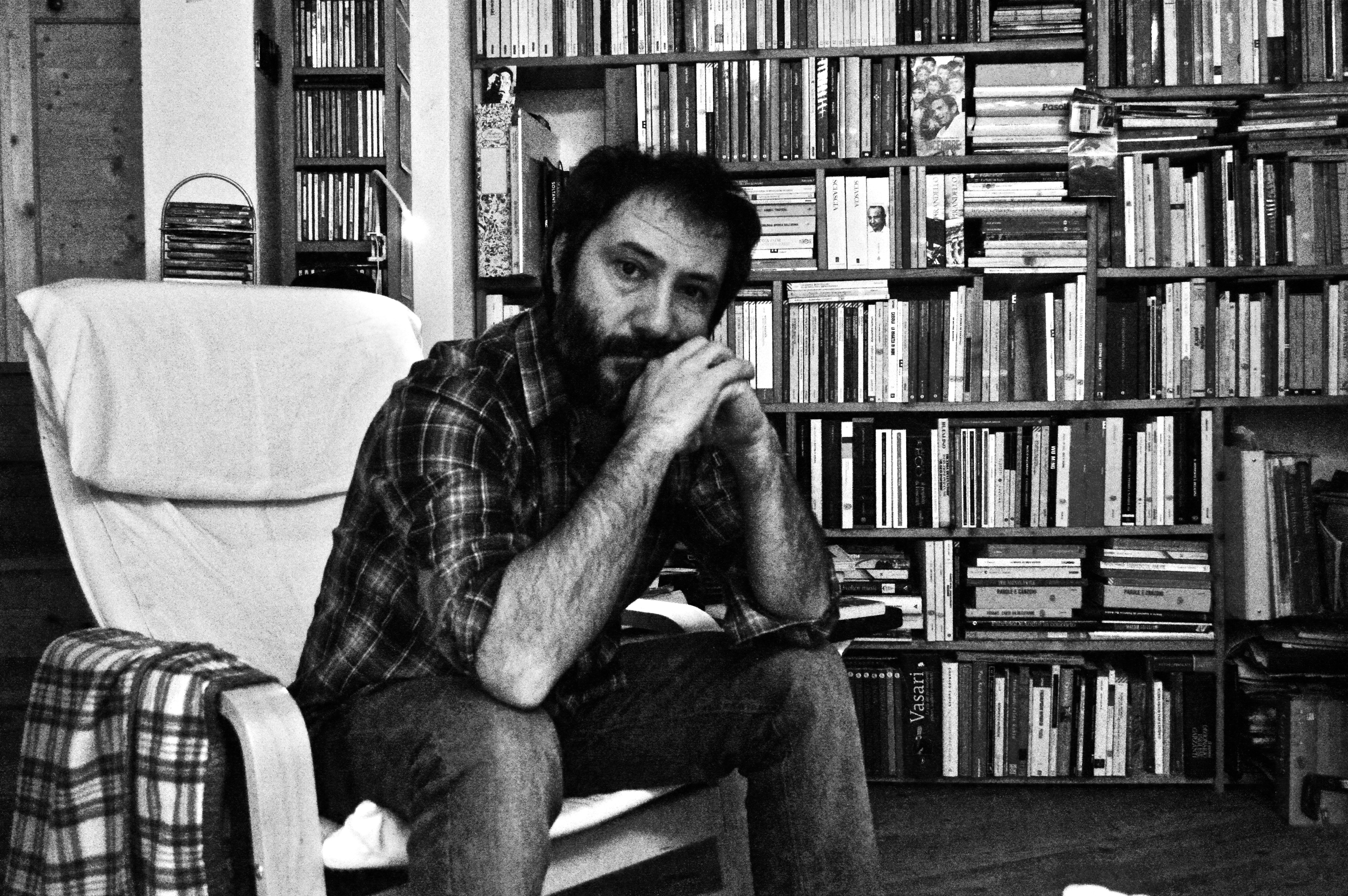 L'autore nel suo studio